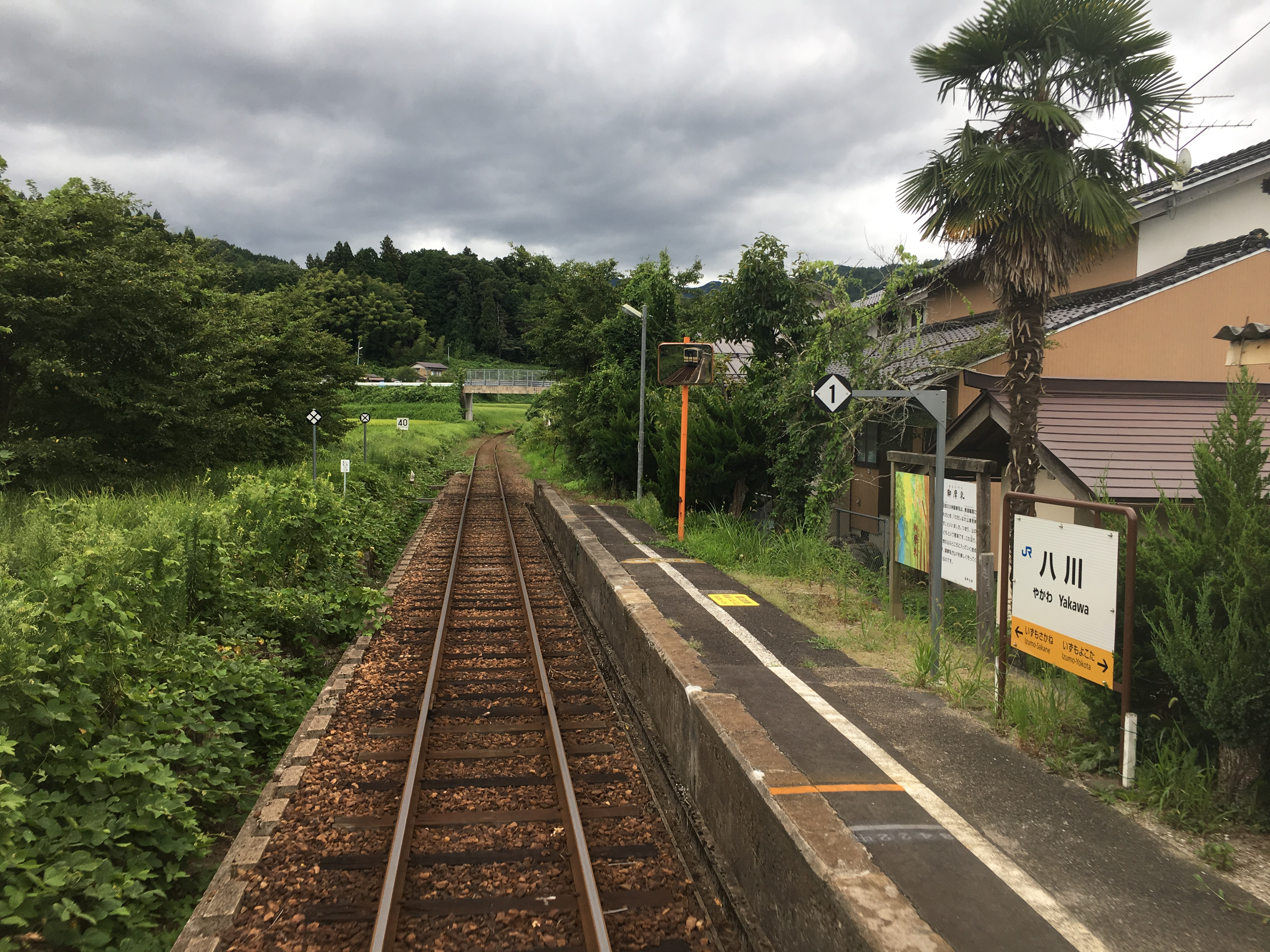 八川駅 (yakawa Station)